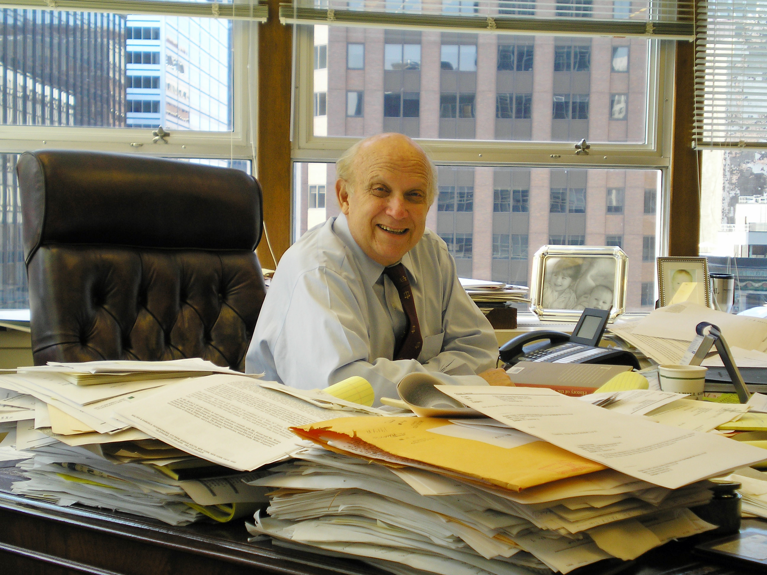 Floyd Abrams